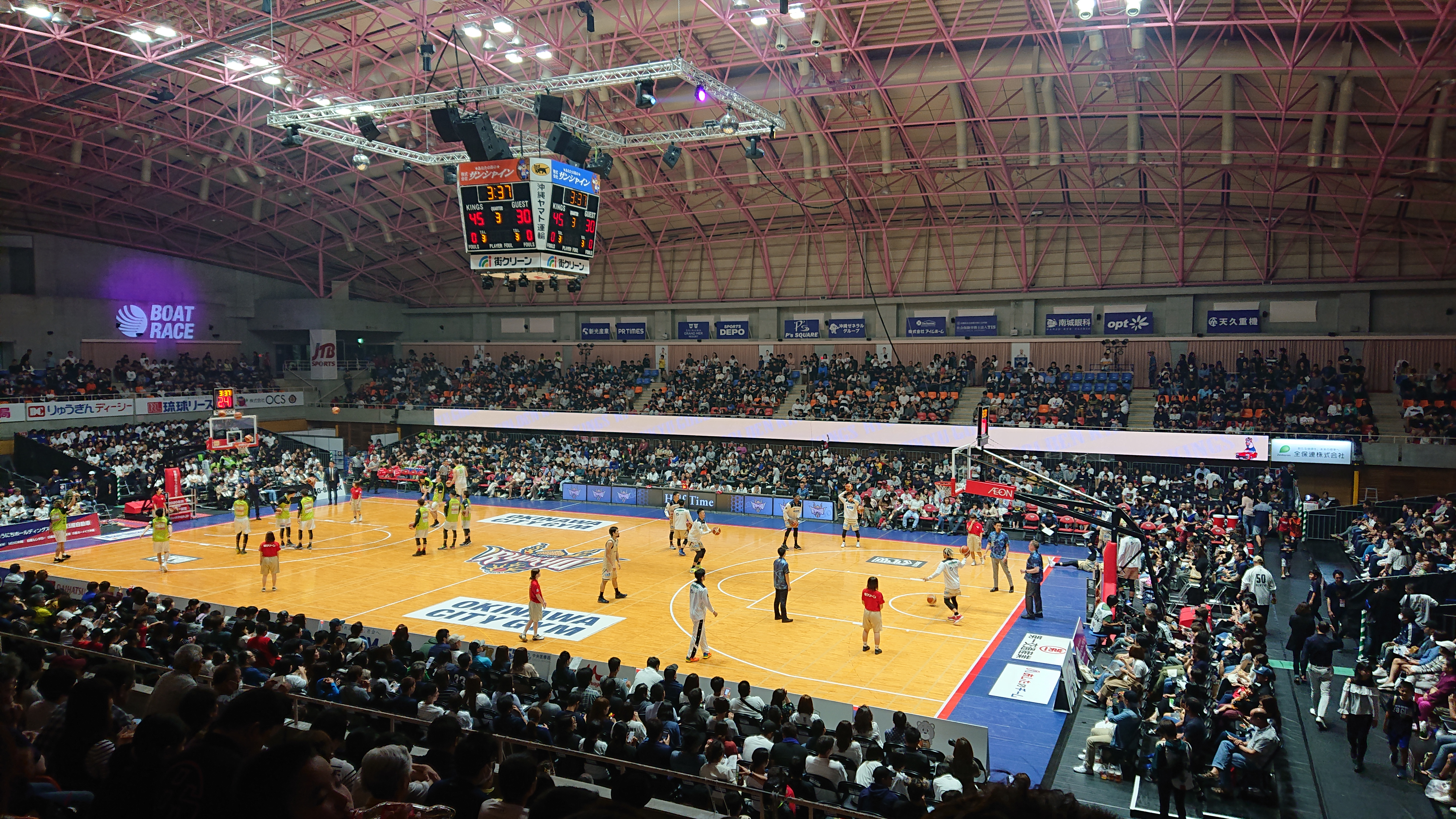 B.LEAGUE 第25節 琉球ゴールデンキングスvsレバンガ北海道 沖縄市民体育館 20190302(1)